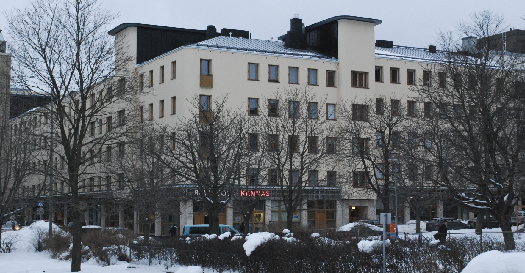 Talo Helsingin Kampissa/Hietalahdessa. Rakennuksessa sijaitsevien asuntojen, liikehuoneistojen ja toimistojen osoitteet ovat Köydenpunojankatu 13, Eerikinkatu 43, Ruoholahdenkatu 24 tai Köydenpunojankatu 15.